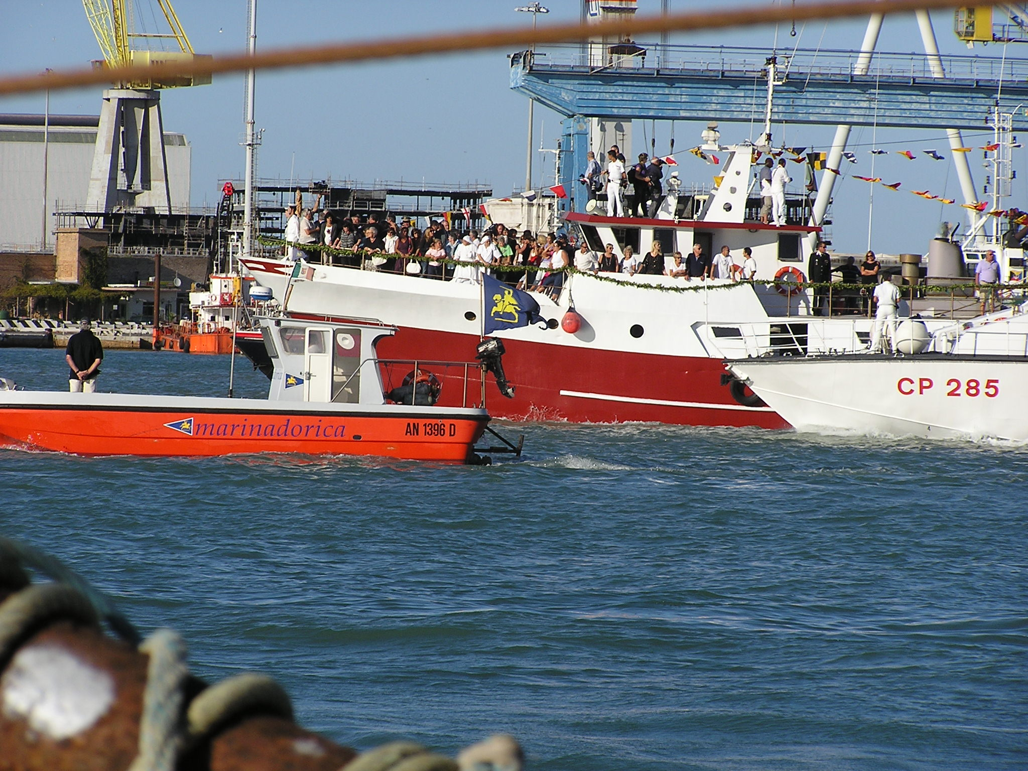 La prima domenica di settembre si svolge in Ancona la Festa del Mare, il cui momento più importante è la processione di imbarcazioni di tutti i tipi che si dirige dalle banchine del porto verso il largo. La foto, del 2009, rappresenta questo momento e in particolare la nave sulla quale si trova l'Arcivescovo, che dovrà svolgere la cerimonia religiosa una volta che la processione sarà arrivata al largo. Sulla barca della Marina Dorica sventola una bandiera con il cavaliere araldico, stemma della città.